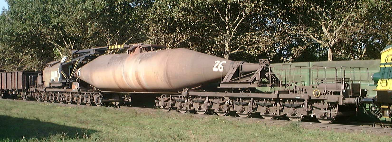 Torpedowagen für innerbetrieblichen Flüssigeisentransport